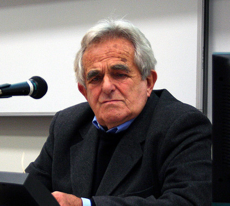 Marek Waldenberg